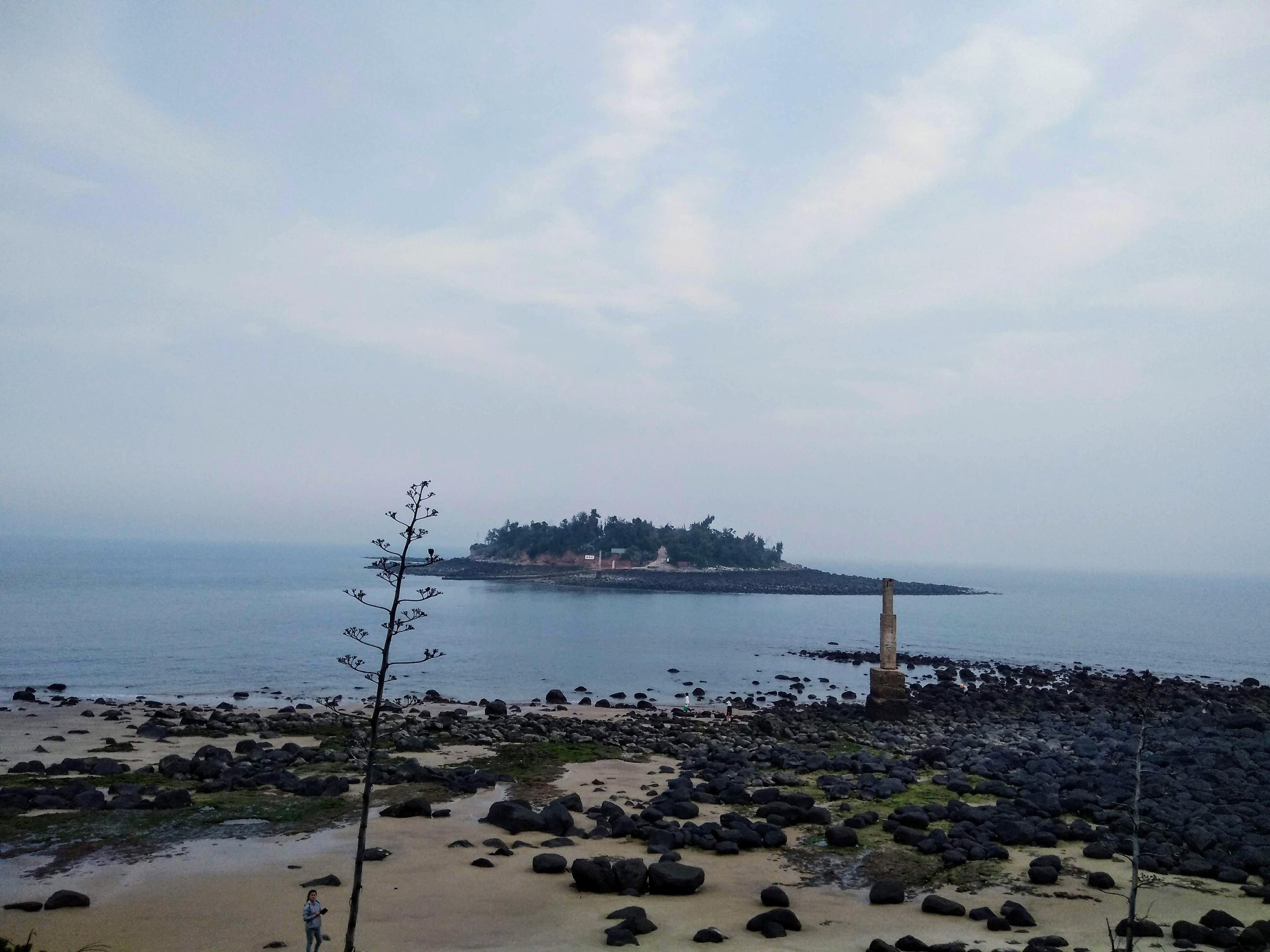 小金門綠石槽